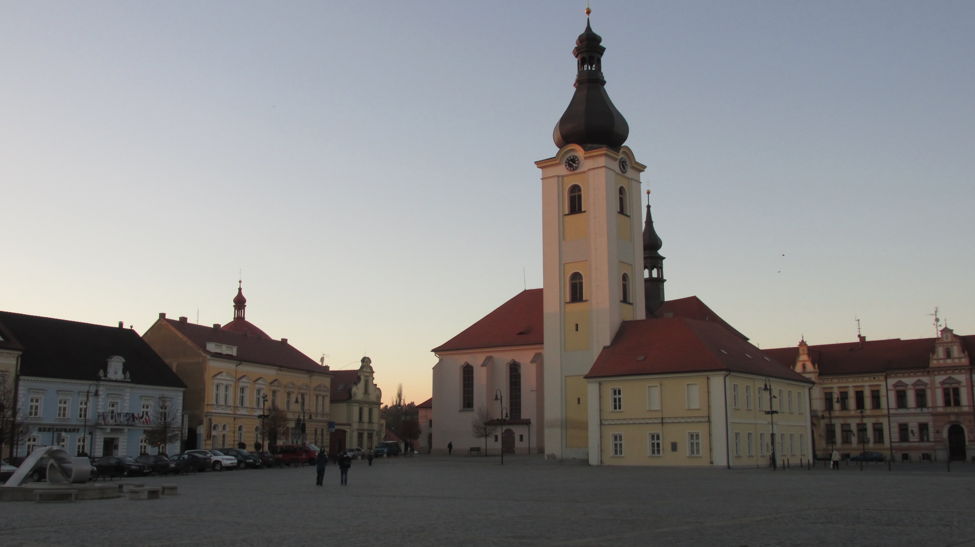 Kostel svatého Mikuláše se zvonicí, náměstí T. G. Masaryka, Dobřany.